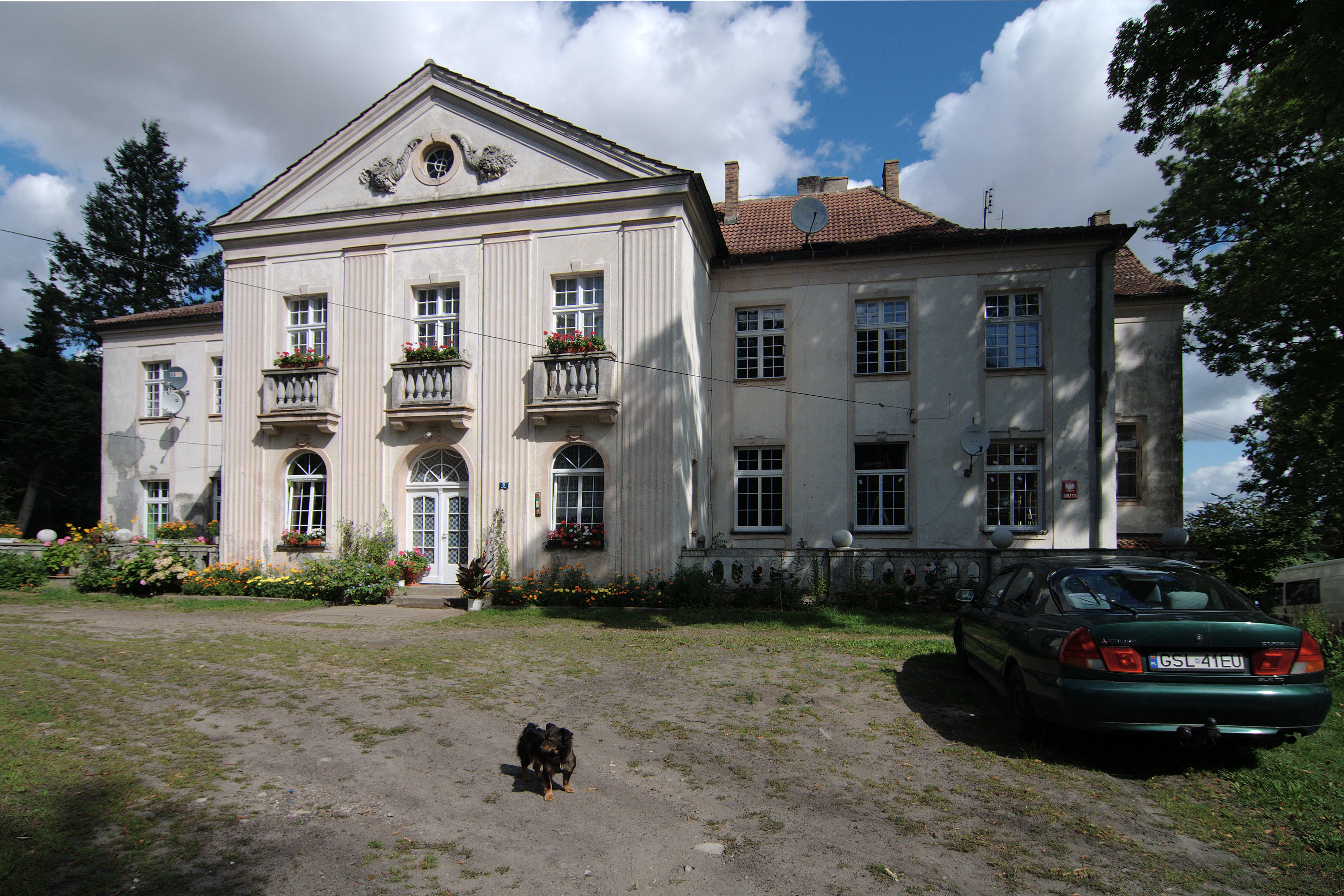 Głuszyno, pałac, pocz. XX